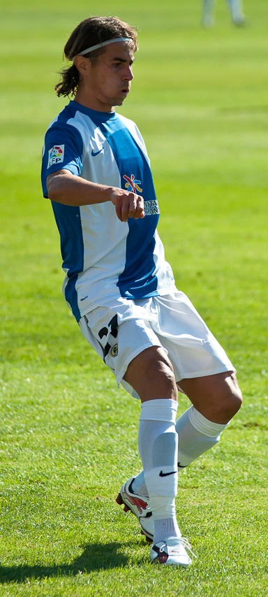 El jugador herculà David Cortés